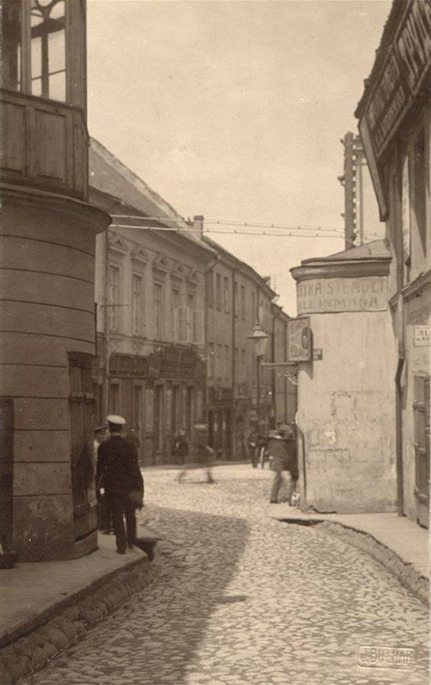 Беларуская (тарашкевіца): Вільня (Vilnia), вуліцы Дамініканская (vulica Daminikanskaja) і Ўнівэрсытэцкая (vulica Ŭniversyteckaja)